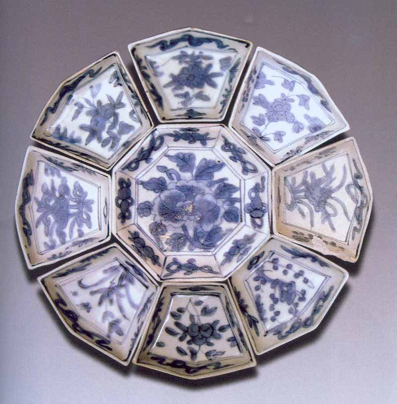 Ảnh này do người truyền lên chụp tại Bảo tàng lịch sử Việt Nam